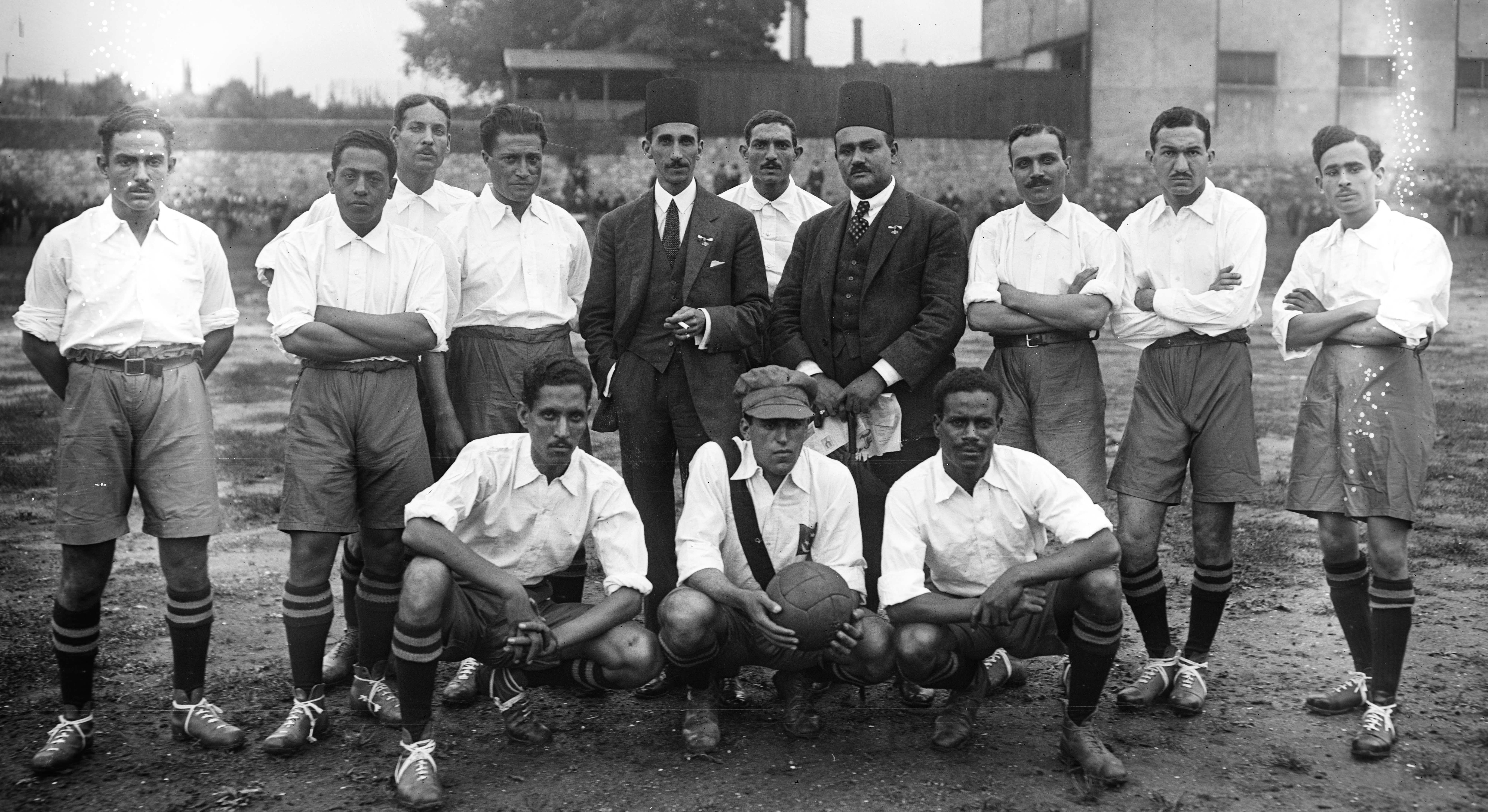 Équipe d'Égypte [de football], Saint-Ouen, 1-8-20.